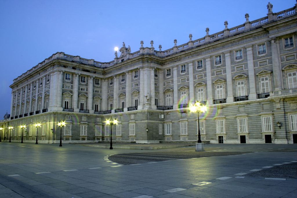 Palacio Real de Madrid, España. Fachada de la Plaza de Oriente.